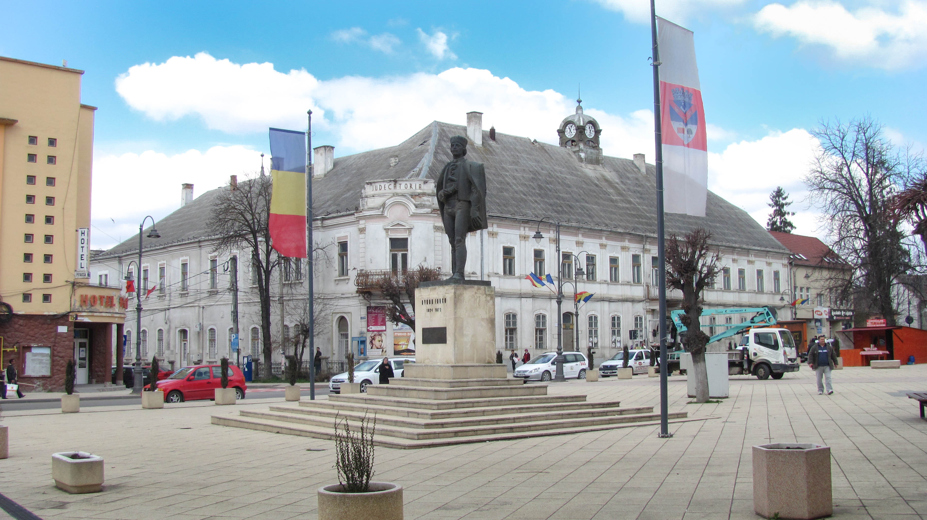 Turda - Statuia lui Avram Iancu (Piaţa Republicii)